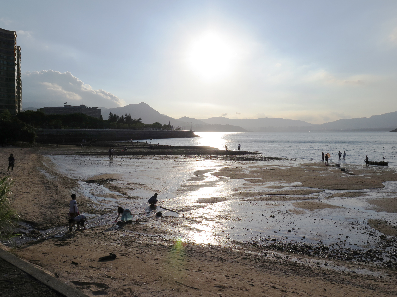 Wu Kai Sha Sands